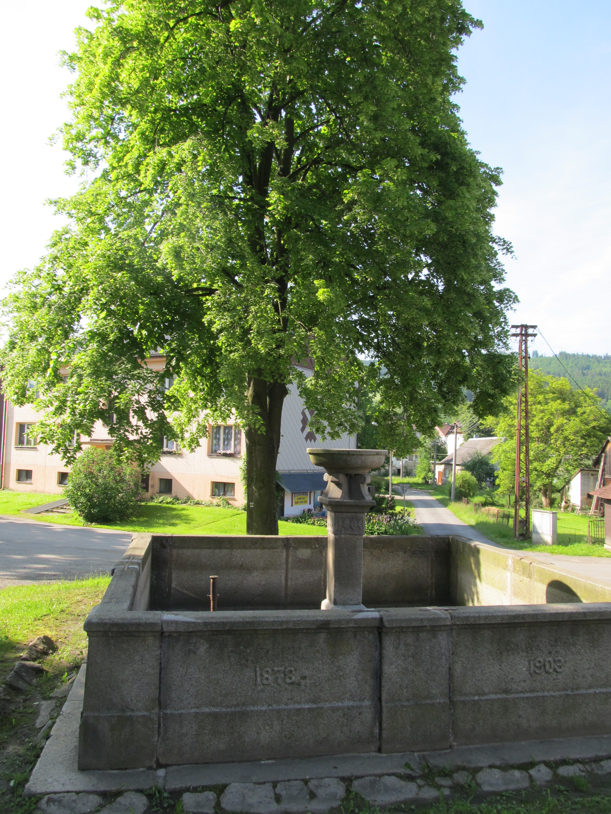 Dešenice - kašna